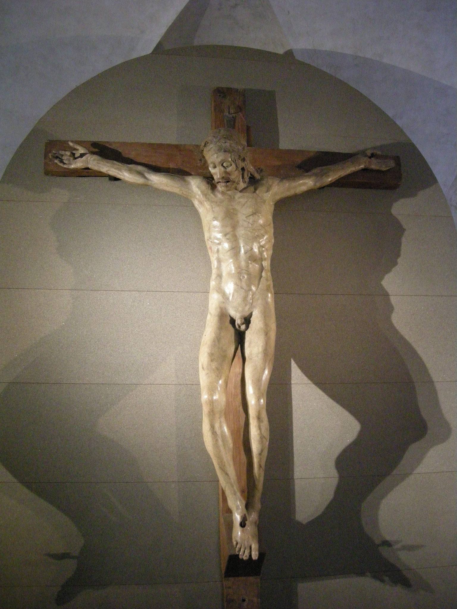 Crocifisso del bosco ai frati, scuola di donatello, 1460 circa